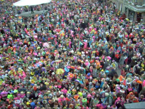 Photo de carnaval prise depuis la mairie de Bergues Travail personnel (own work)